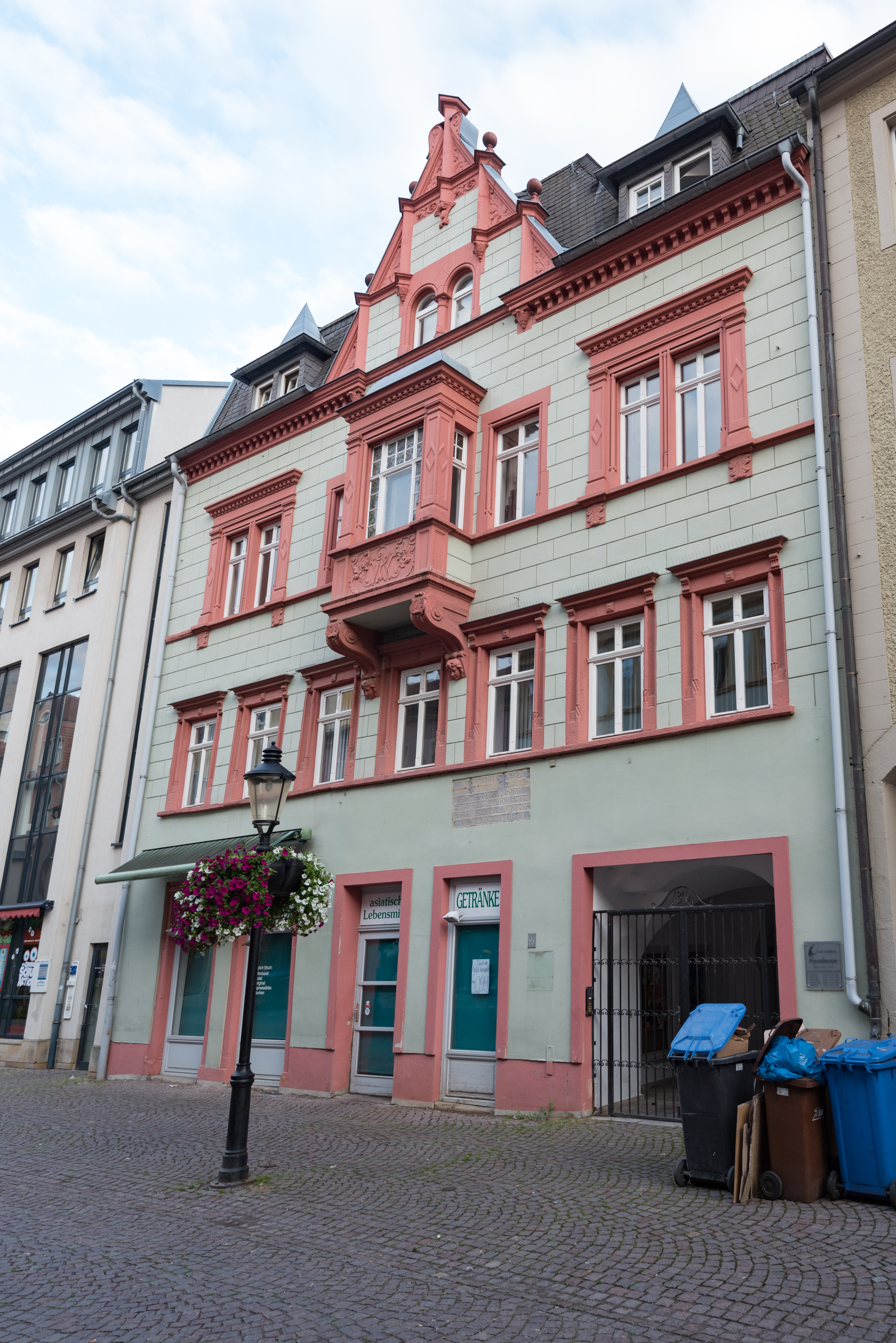 Naumburg (Saale), Salzstraße 34